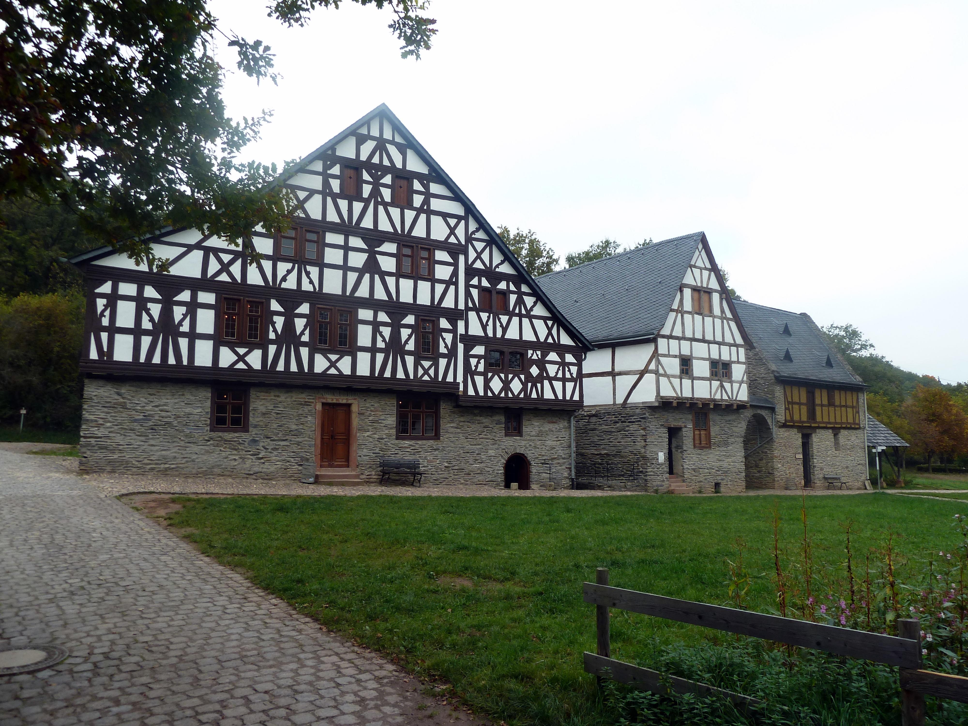 Rheinland-Pfälzisches FREILICHTMUSEUM Bad Sobernheim – Haus Enkirch und Haus Zell-Merl